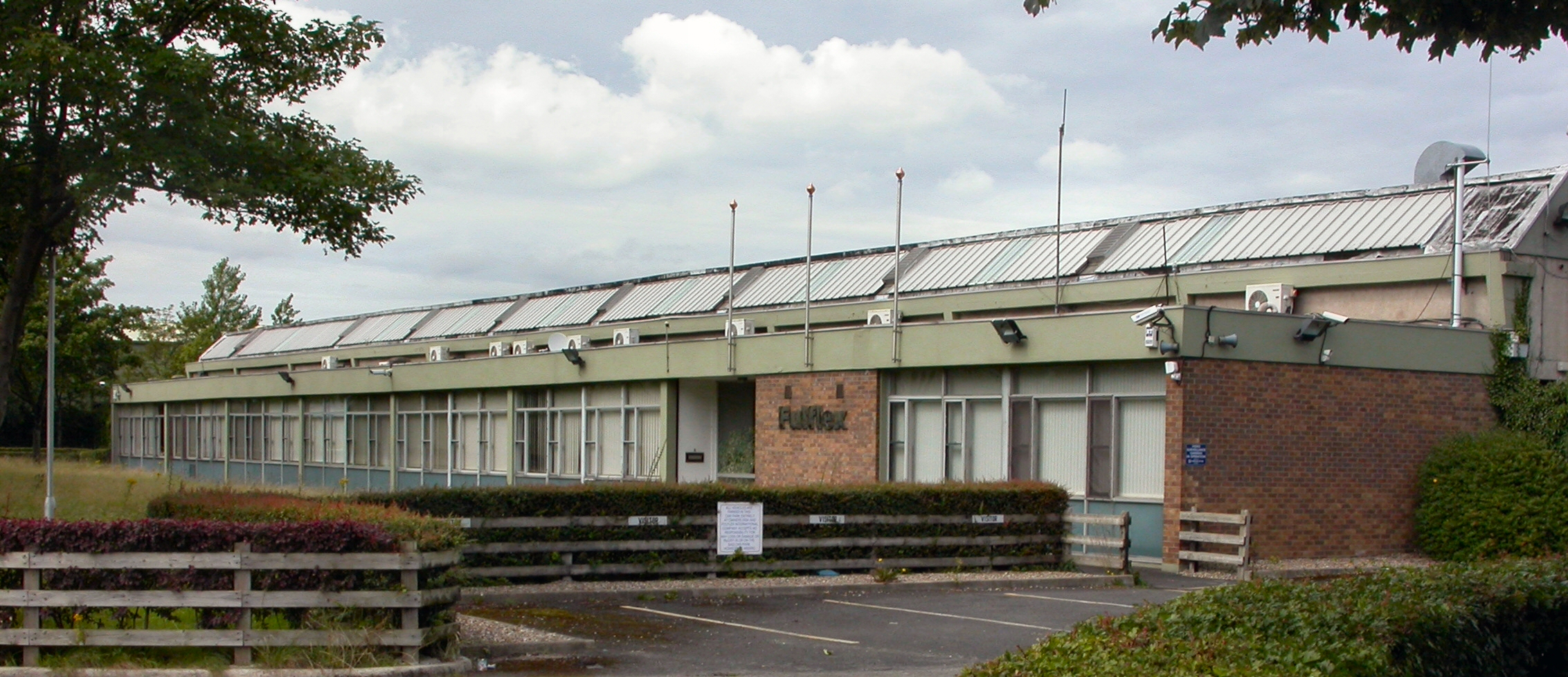 Monarchan Fulflex, Luimneach